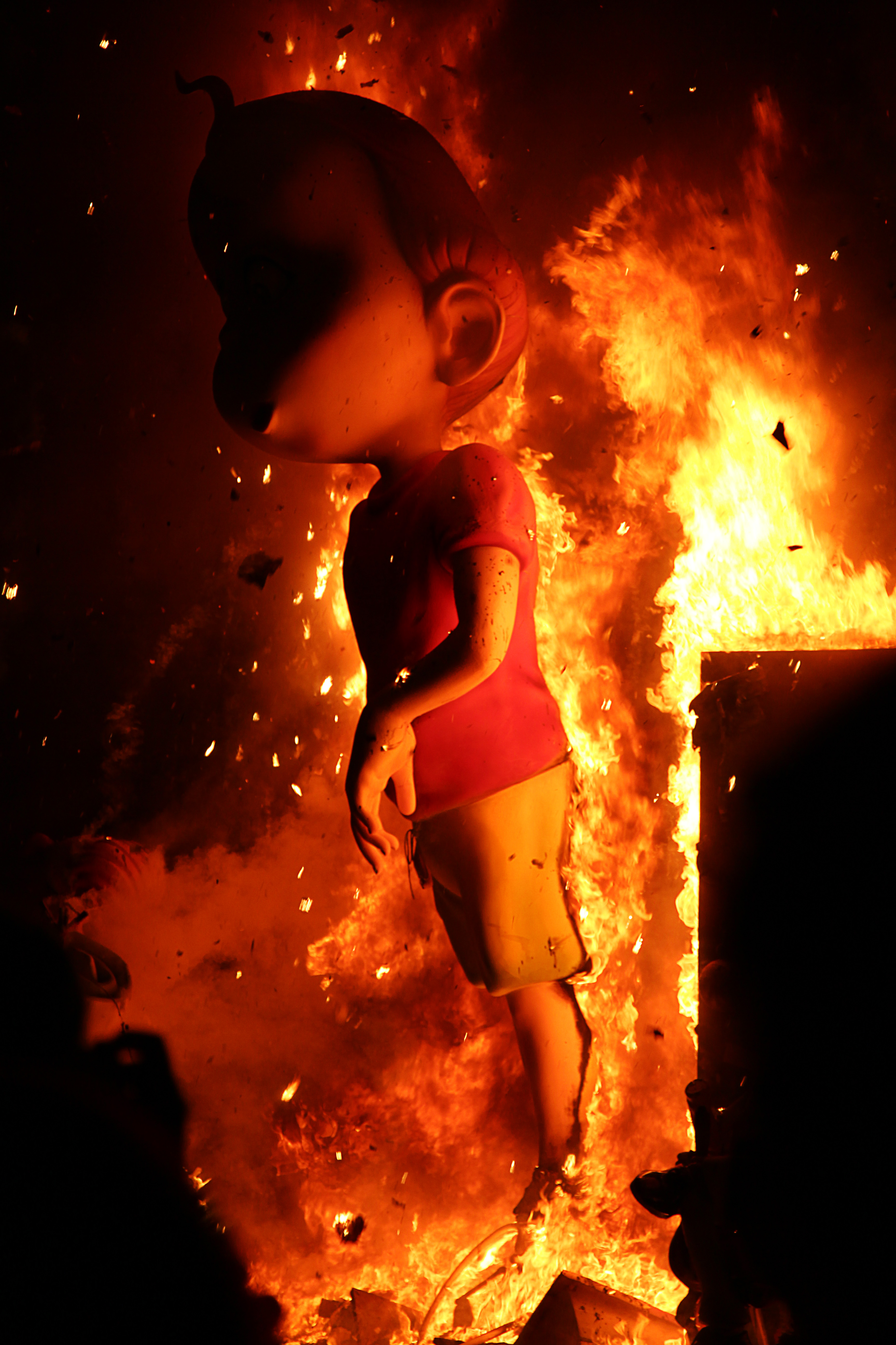 La Nit de la Cremà marca el final de las fiestas falleras This is a photography of a Folklore festival in Spain (Wikidata id Q1143768).